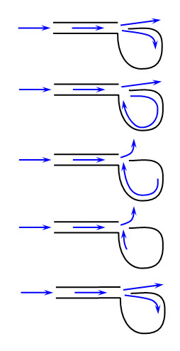 Поток воздуха во входном канале в районе щели разделяется ребром резонатора на два потока. Нижний поток описывает внутри резонатора круг и, выходя вверх в районе щели, отклоняет входной поток вверх, прерывая ту его часть, которая проходит в резонатор.